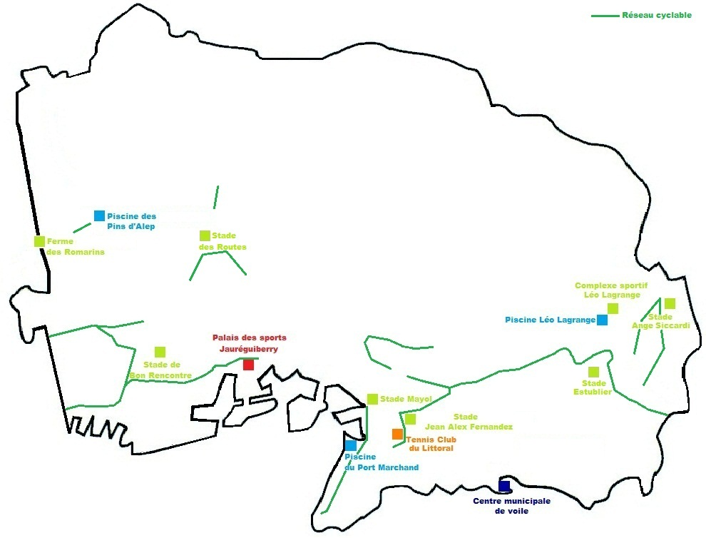 Carte géographique du sport à Toulon montrant les principales installations et aménagements sportifs.